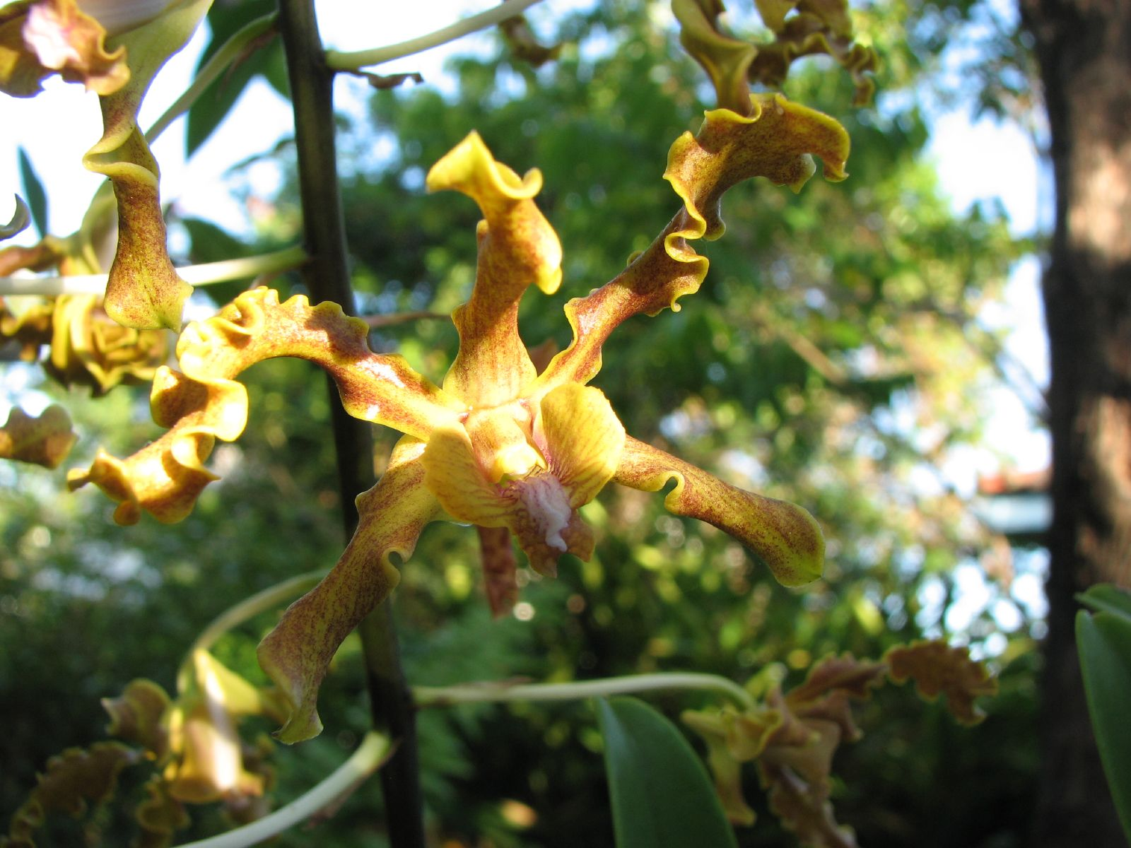 Fleur d'orchidée australienne